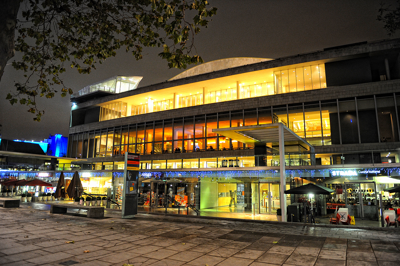 Royal Festival Hall